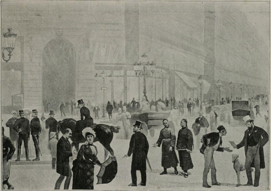 Planche du livret explicatif du panorama le "Tout-Paris" peint par Charles Castellani et présenté lors de l'exposition universelle de 1889.